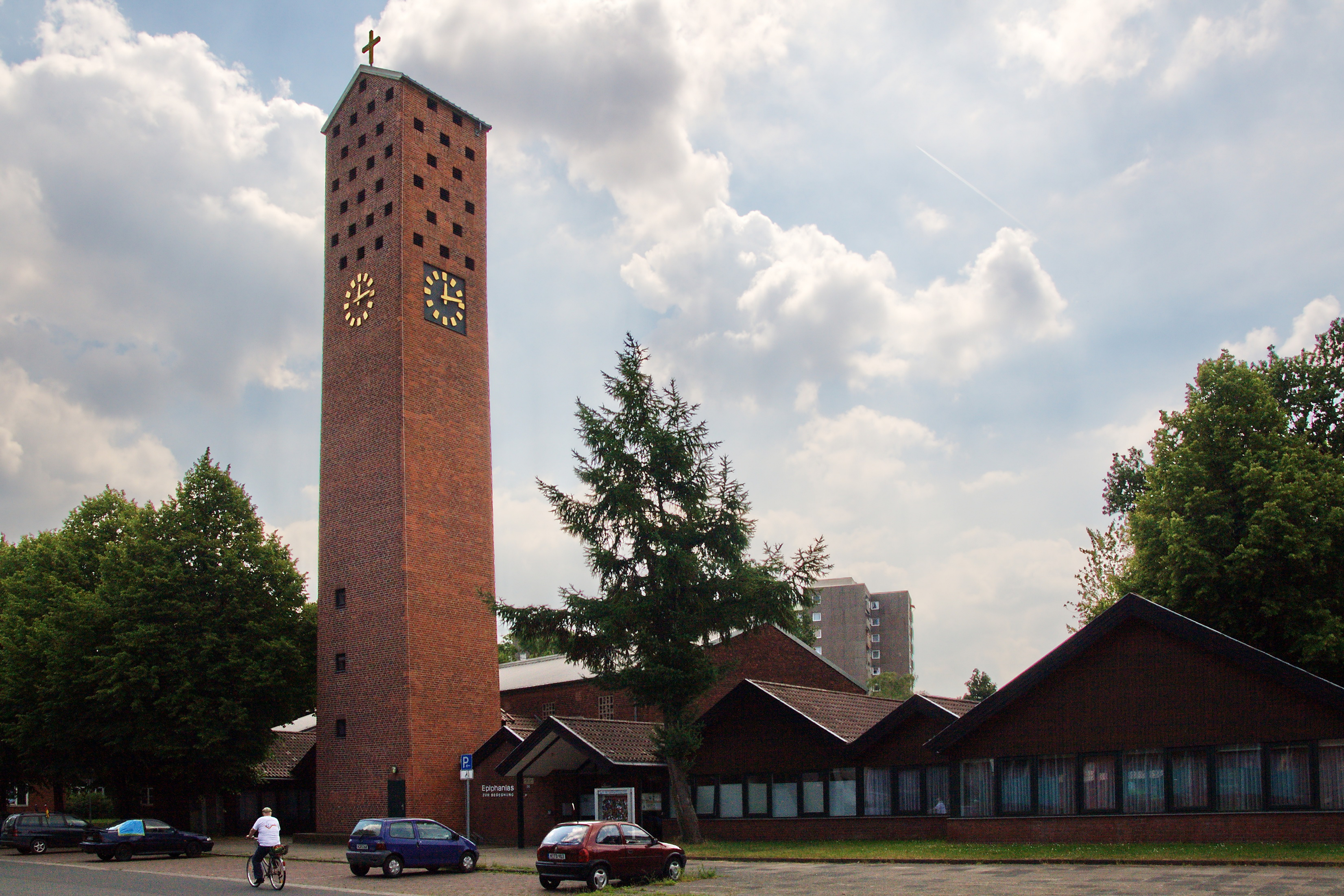 Epiphaniaskirche im Sahlkamp (Hannover), Niedersachsen, Deutschland